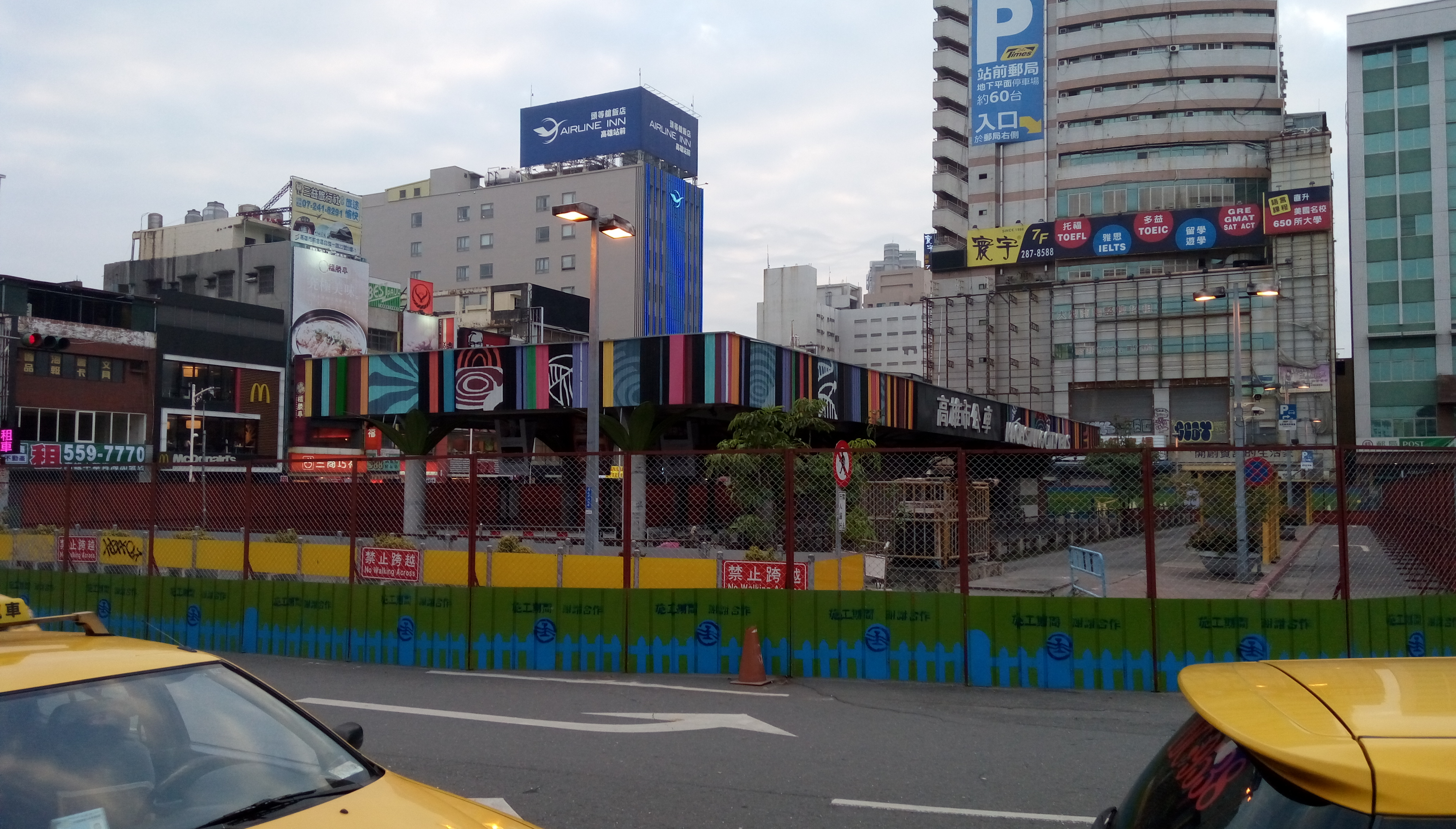 中文（台灣）: 高雄公車站拆除前夕